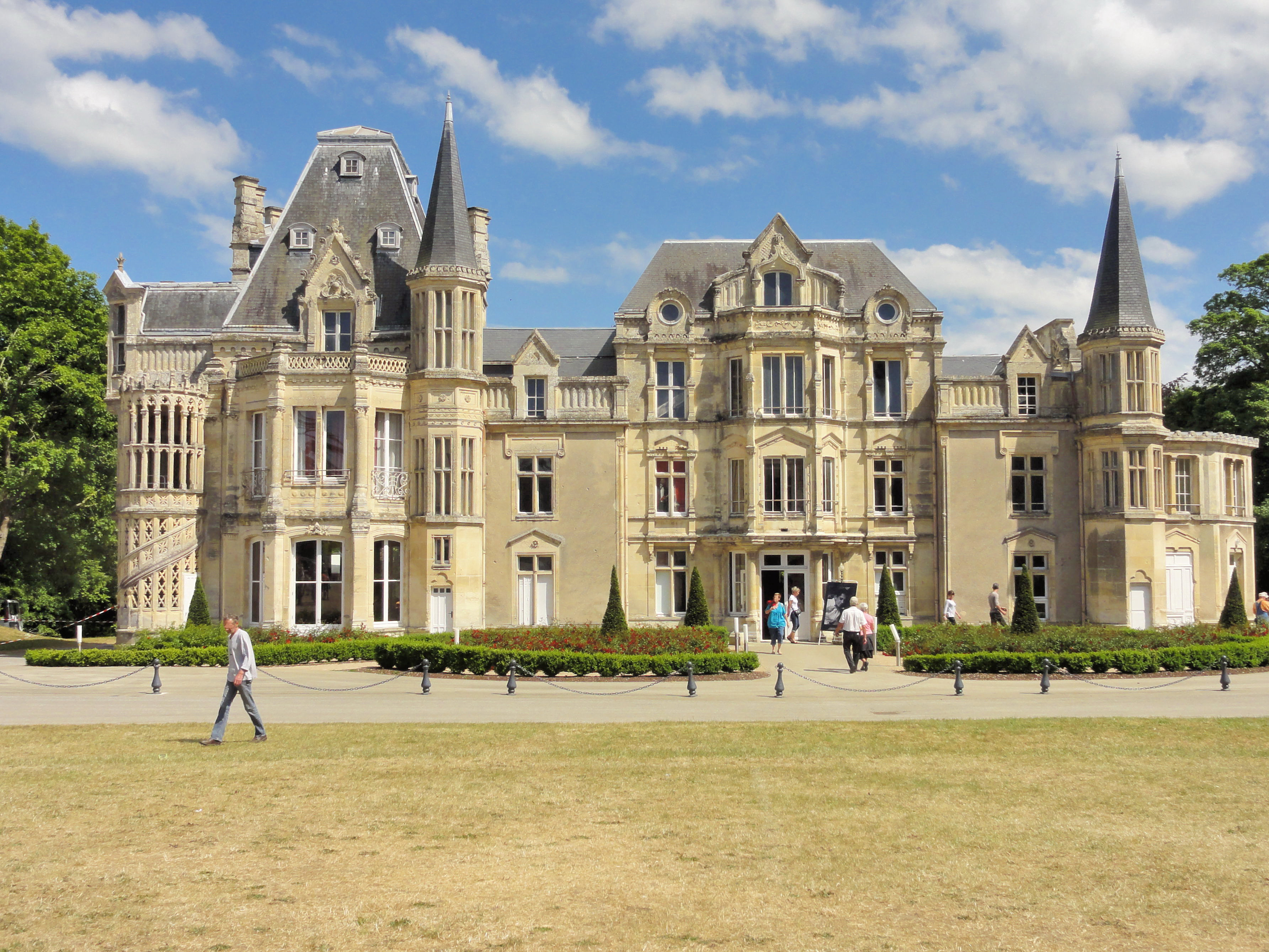 Chateau de Beauregard 475 Herouville Saint Clair Calvados